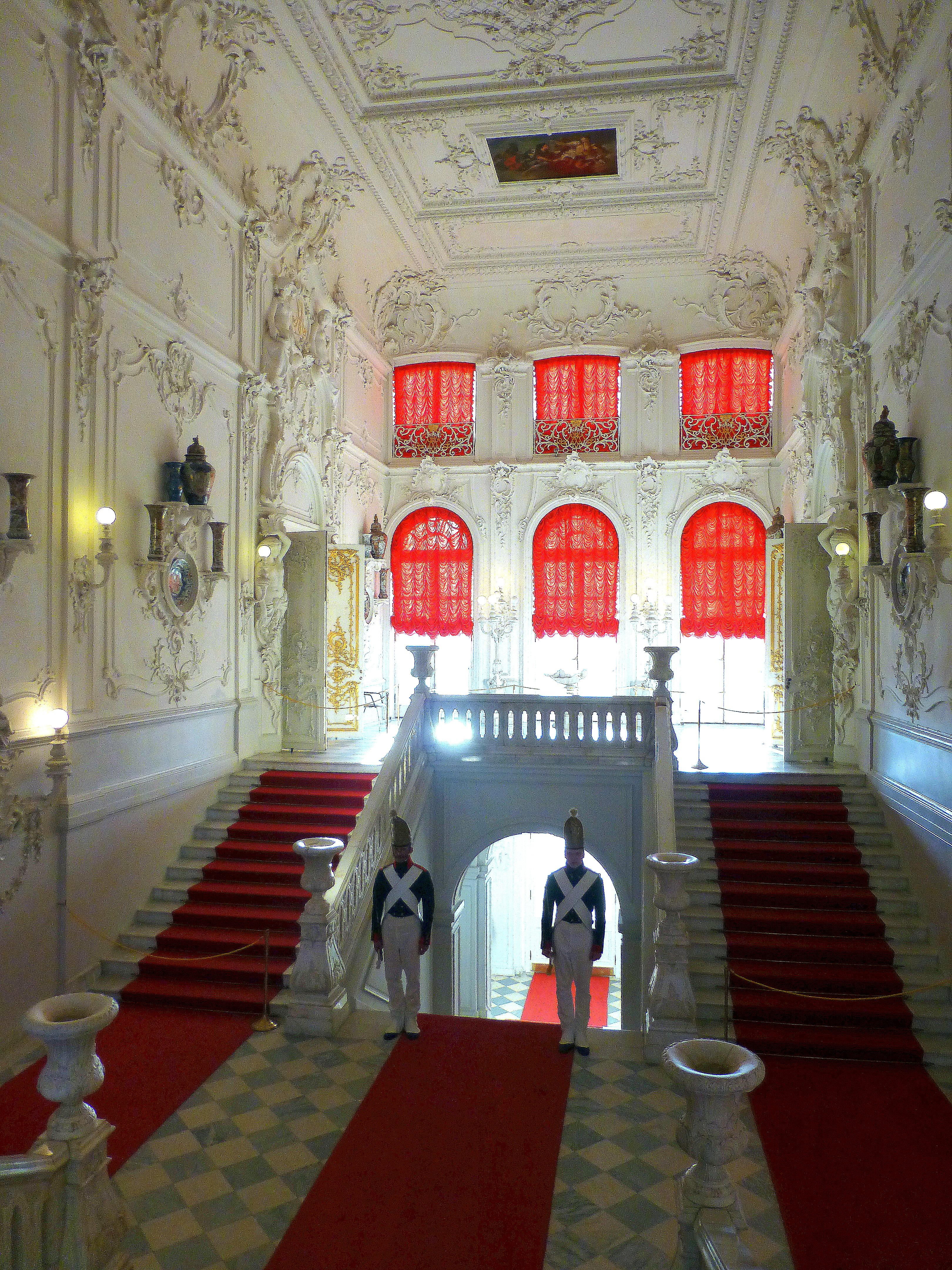 Great Catherine Palace – Indoors --- Большой Екатерининский дворец - В помещении